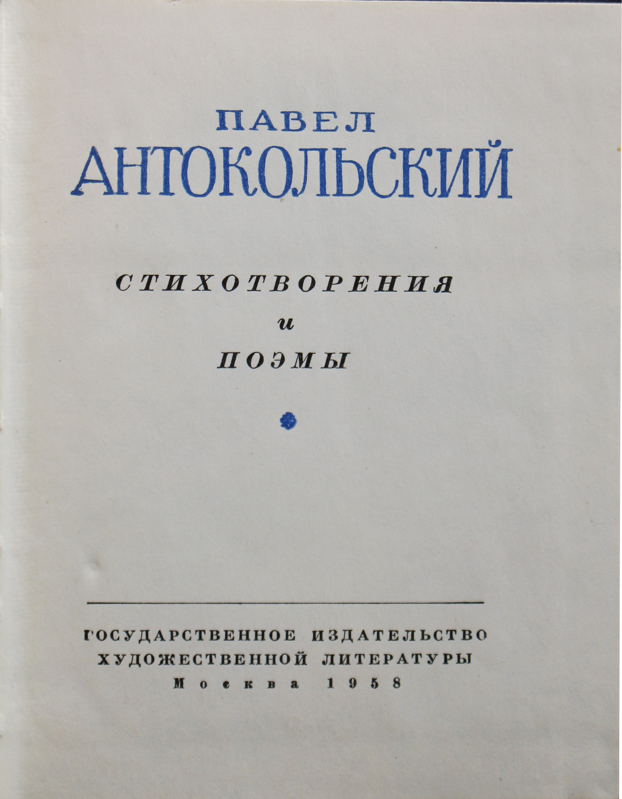 Soviet poet Pavel Antokolsky book.